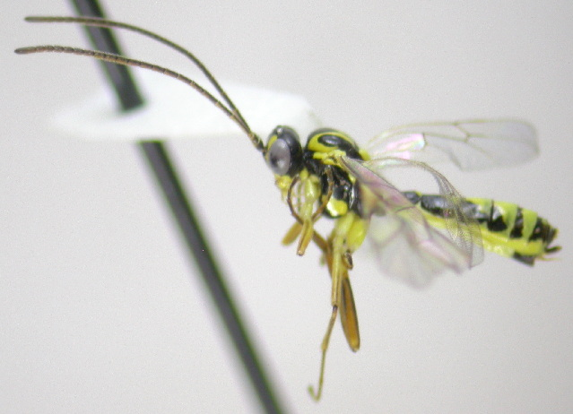 Xestopelta vertebrata